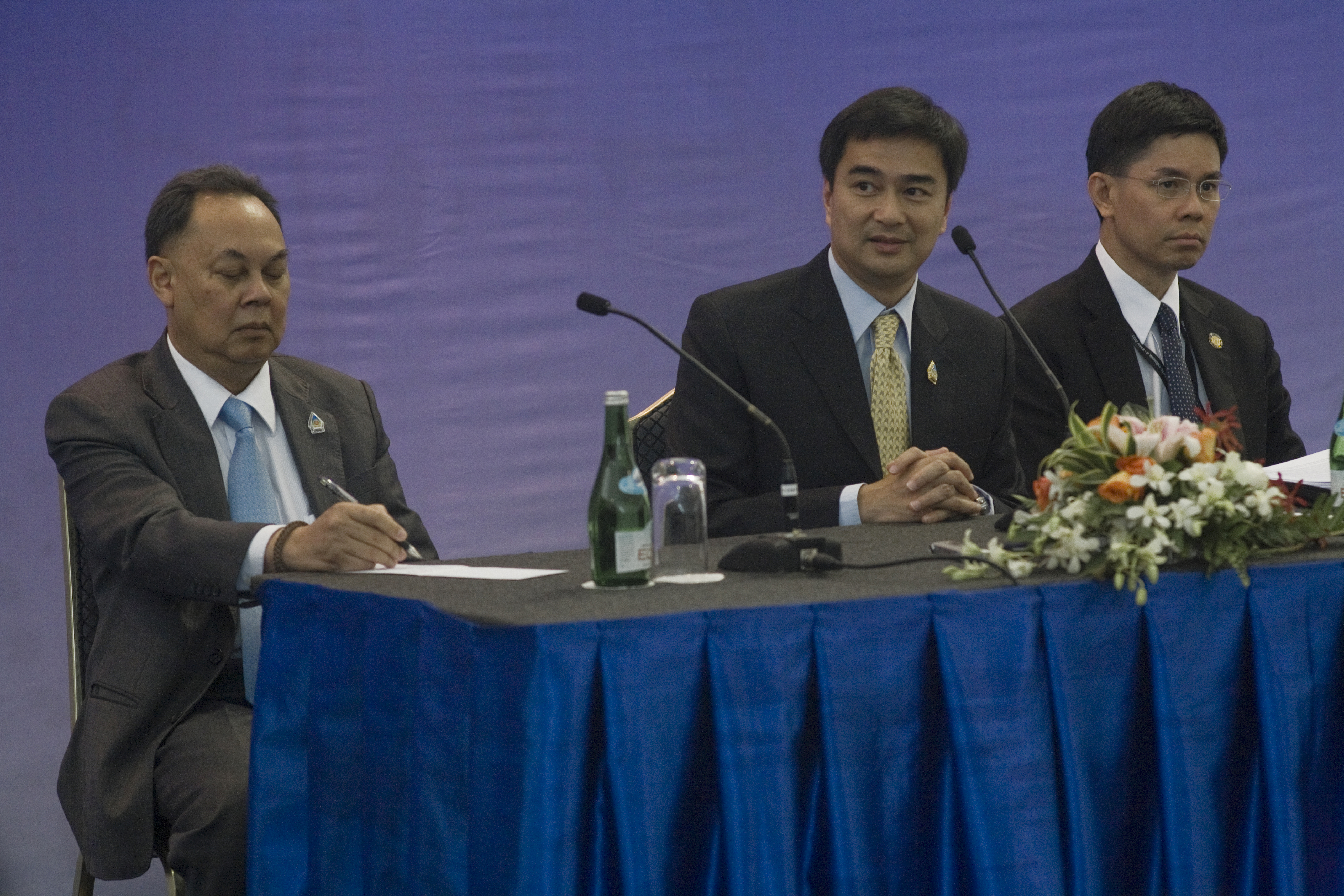 นายกรัฐมนตรี แถลงข่าวต่อสื่อมวลชนหลังจากเข้าร่วมประชุมสุดยอด ASEAN SUMMIT ครั้งที่ 18 ณ Press Conference กรุงจาการ์ตา สาธารณรัฐอินโดนีเซีย วันอาทิตย์ที่ 8 พฤษภาคม พ.ศ.2554 (Photographer attached to the Prime Minister of the Kingdom of Thailand (H.E.Mr.Abhisit Vejjajiva) : Peerapat Wimolrungkarat / พีรพัฒน์ วิมลรังครัตน์) @is50mm